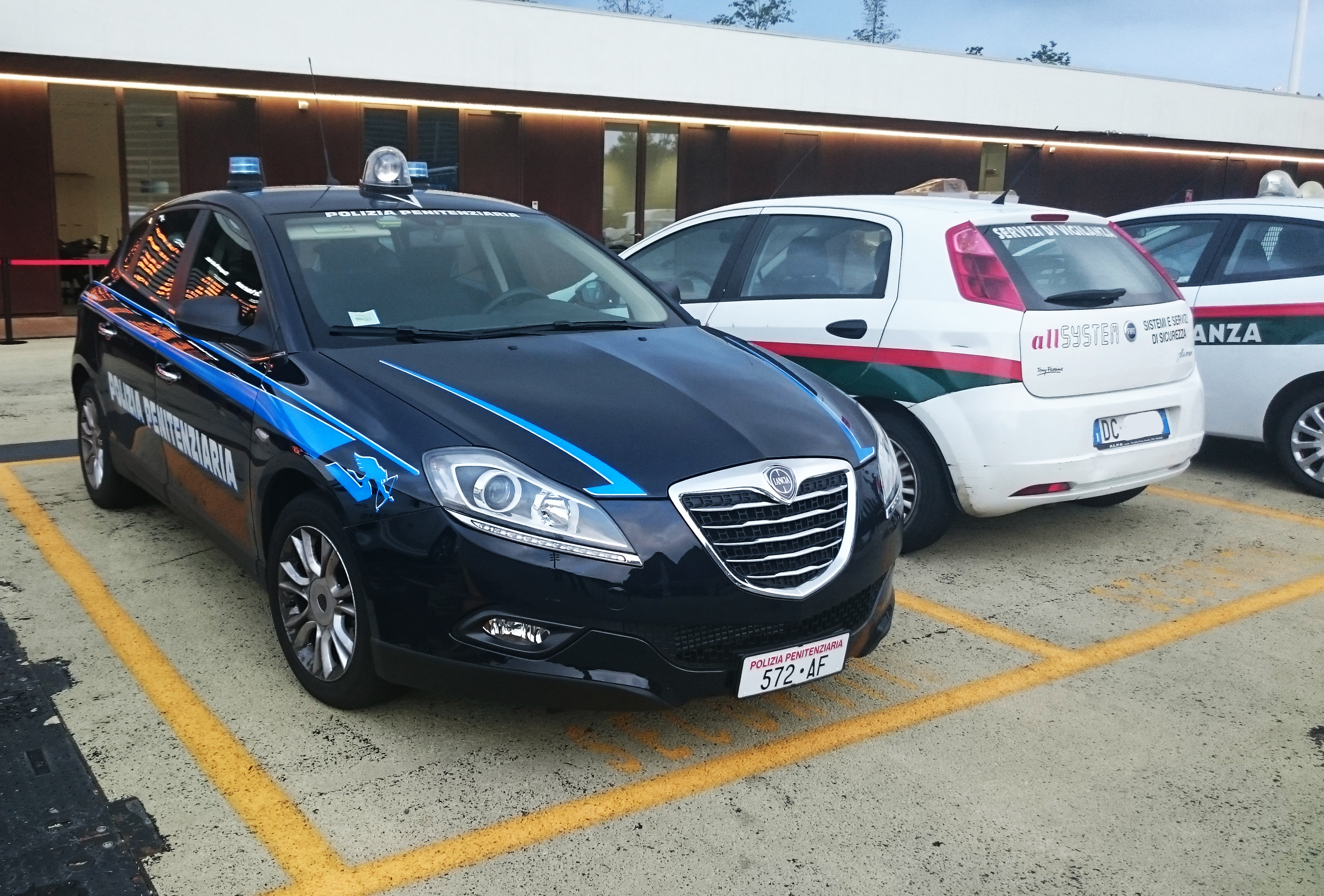 Fiat GP della Vigilanza CIVIS e Lancia Delta della Polizia Penitenziaria all'EXPO Miano 2015